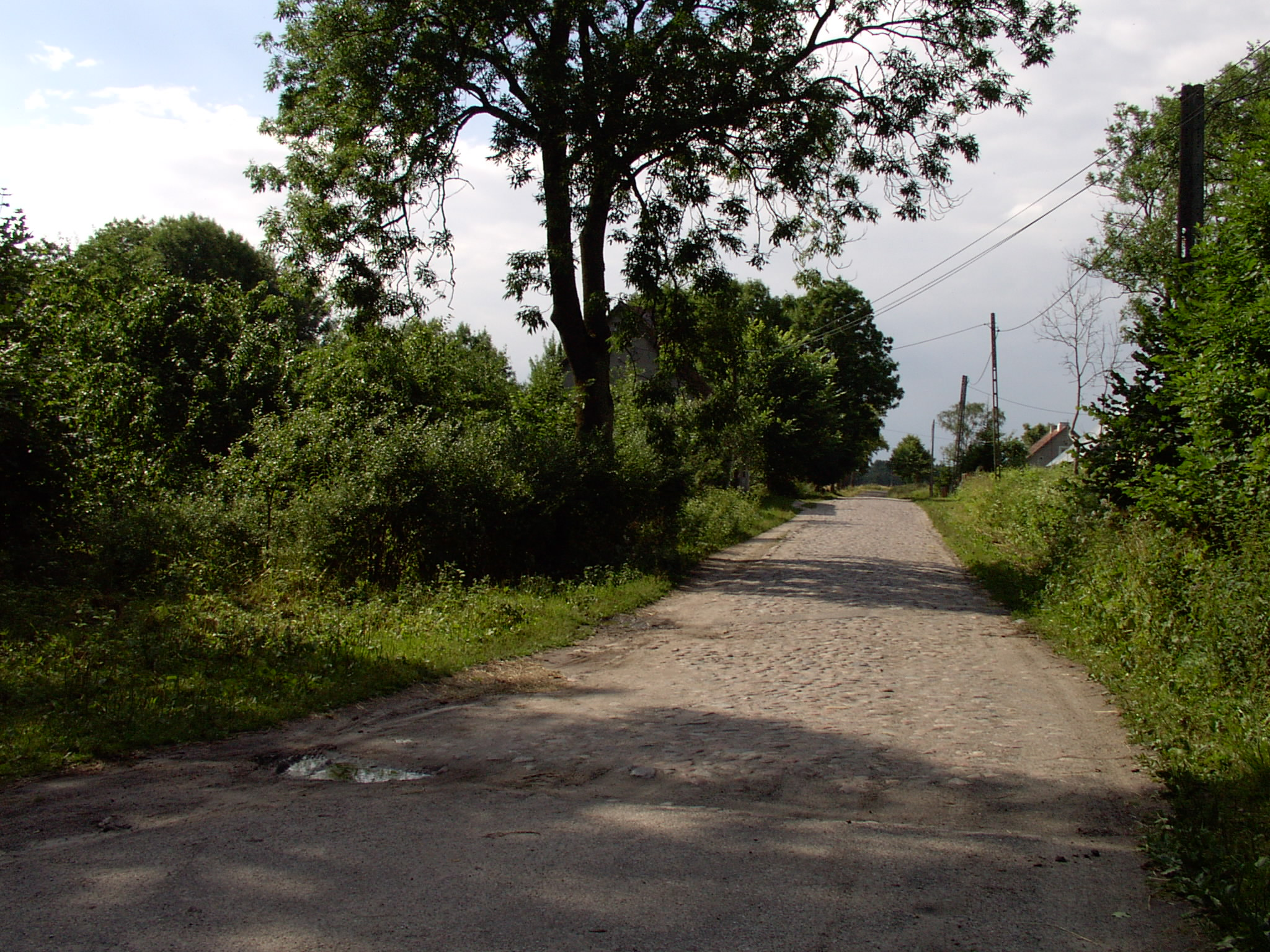 Brukowana droga w Silginach, obok dawnego sklepu i domu p. Branickiego